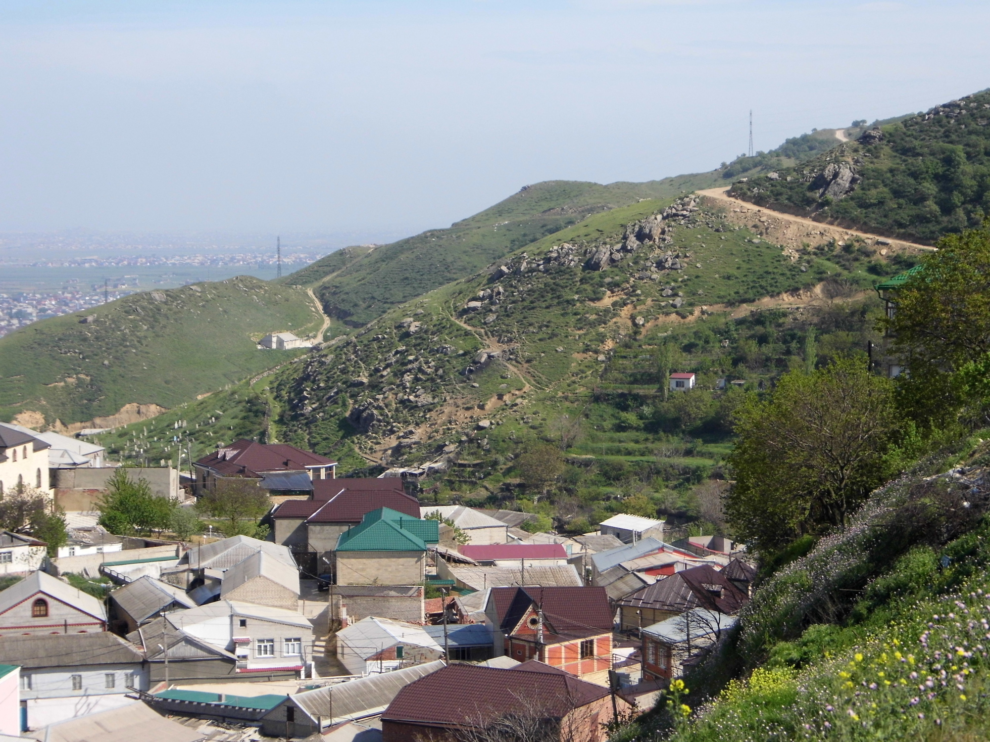 Тарки-Тау, район This image is related to the protected area of Russia number 0500052